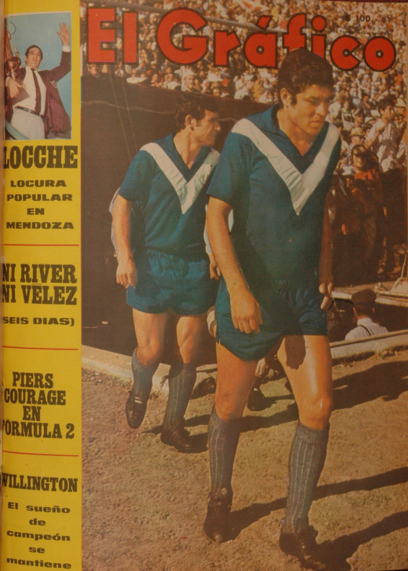 El Grafico del 24 de Diciembre de 1968. Edicion 2568